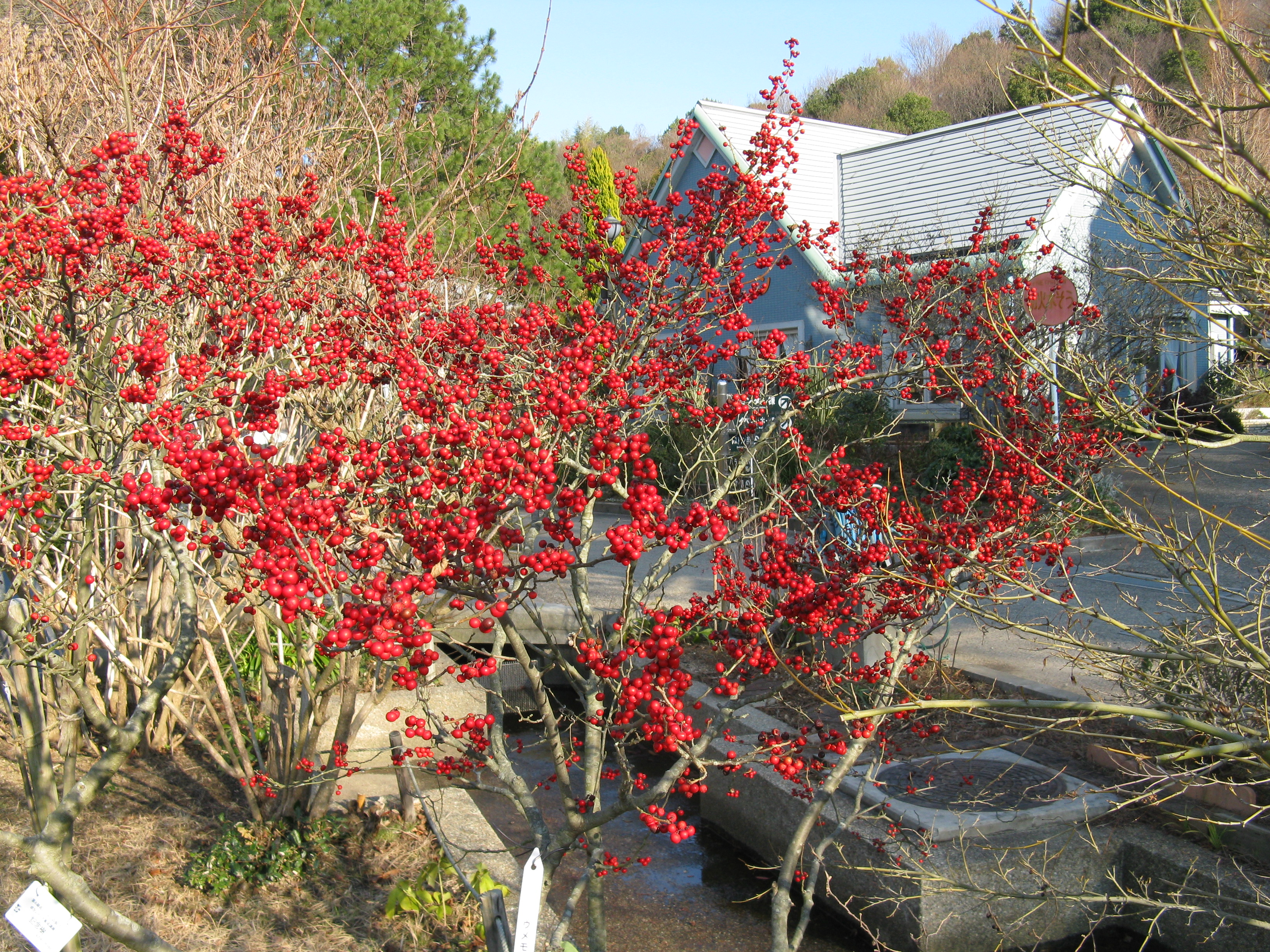 Scientific name Ilex serrata